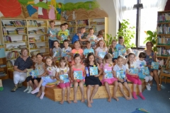 První čtení